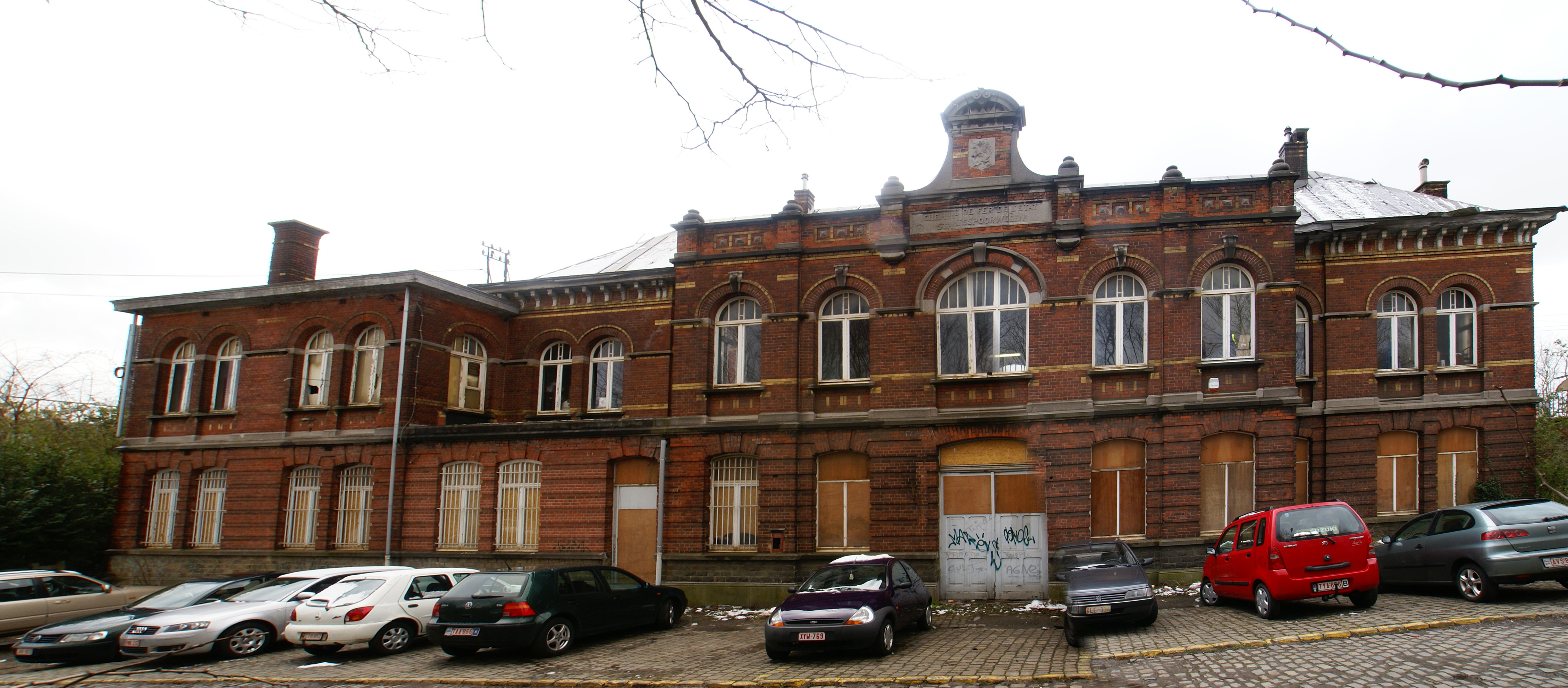 Herstal (Belgium) Railway station Front Façana de l'estació Façade de la gare côté rue voorgevel van het station